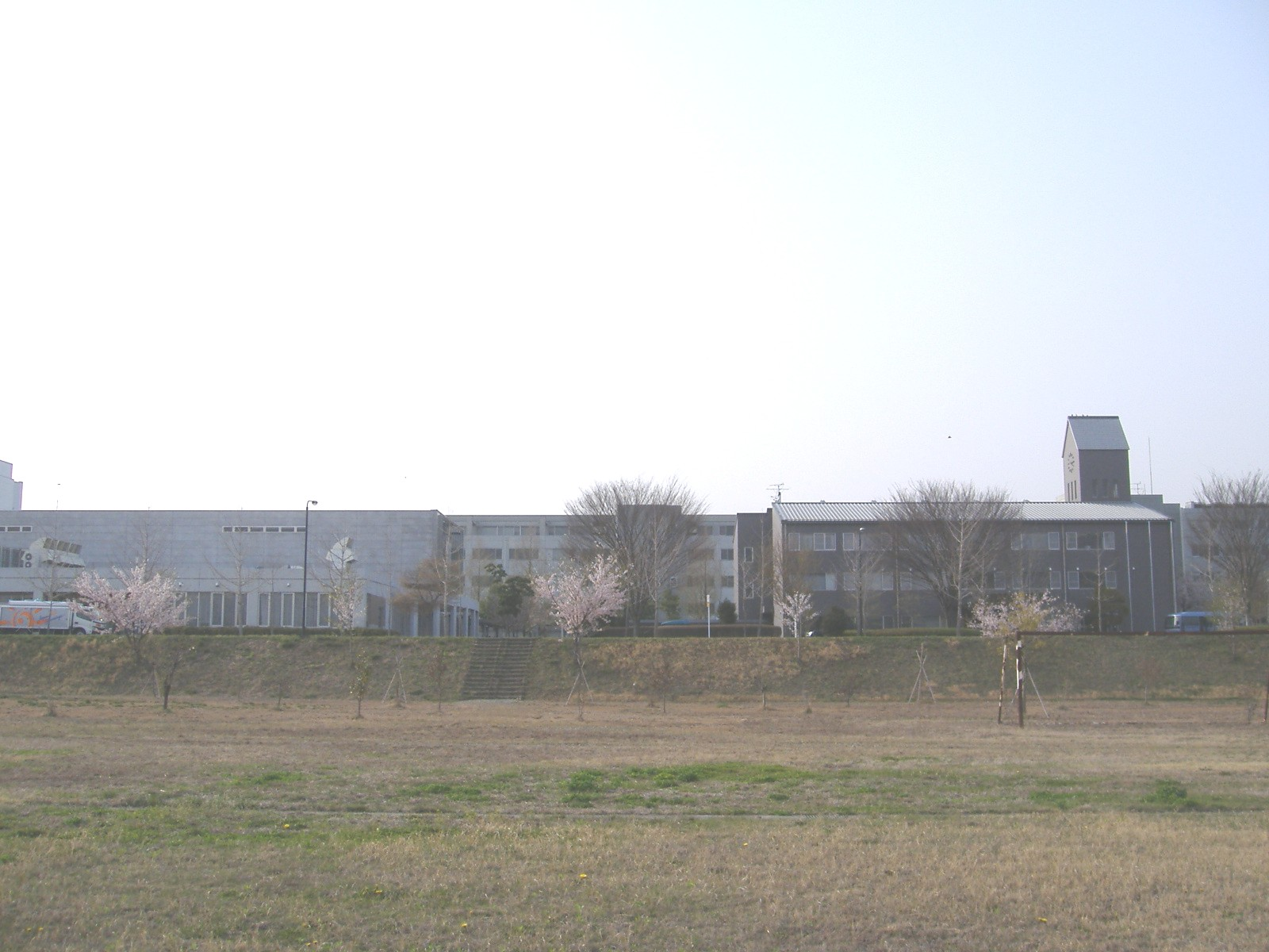 日本の栃木県にある国際医療福祉大学大田原キャンパス。